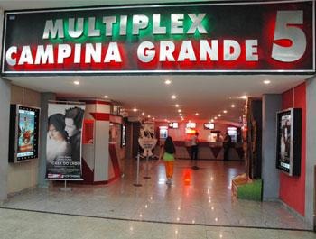 Fachada do Cinesercla do Partage Shopping de Campina Grande, PB